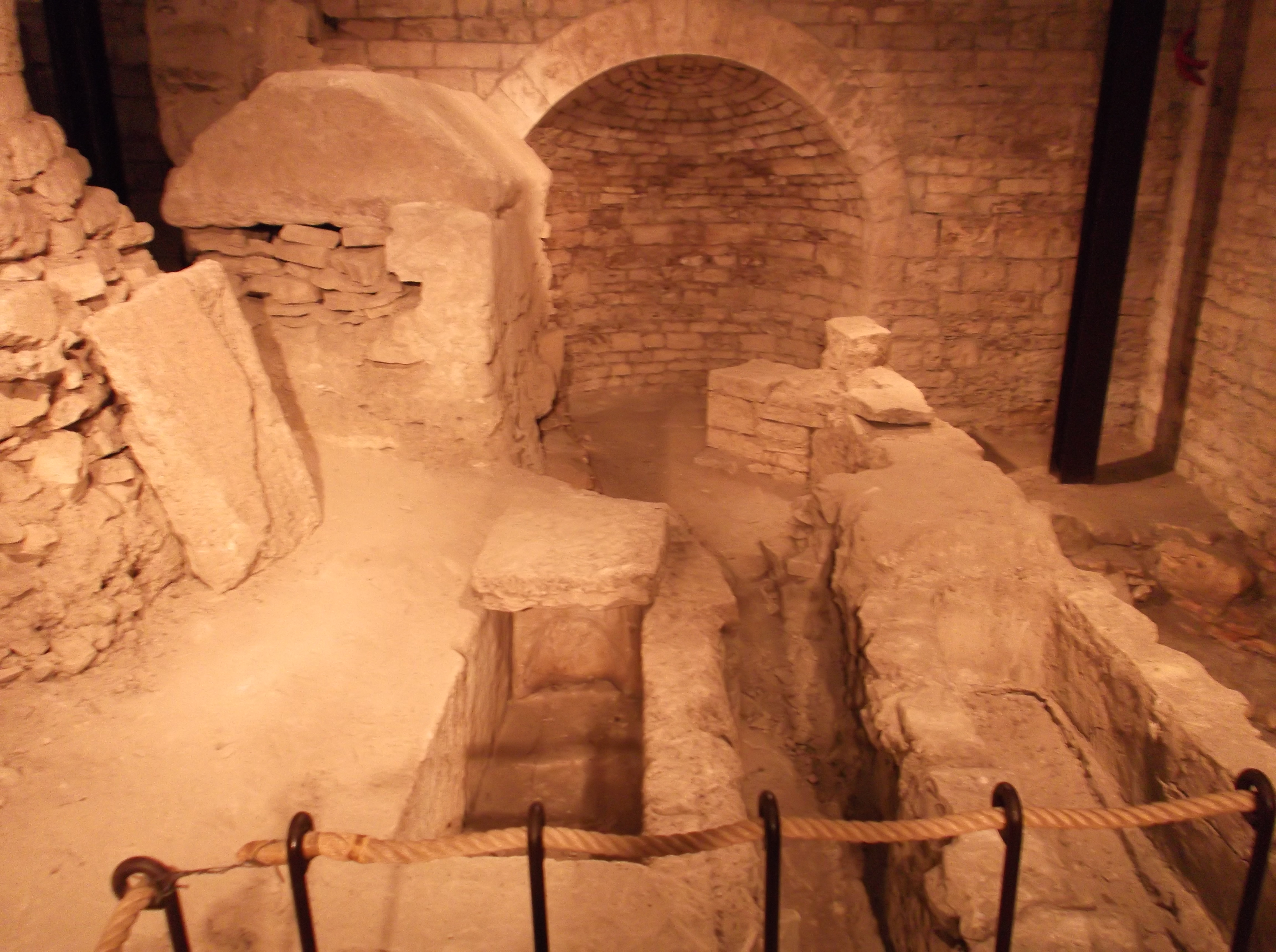 Tombe presenti nell'ipogeo della concattedrale di Ruvo di Puglia